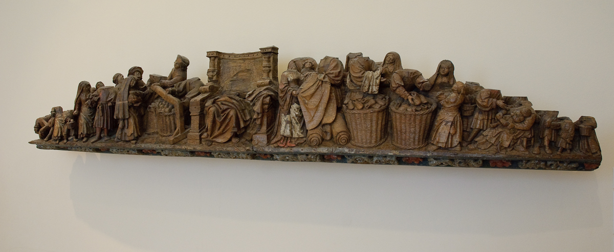 Anoniem, Gevelteken van het geefhuis, 1525/1526 gevelteken van het geefhuis, anoniem, 1525/26